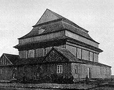 Беларуская (тарашкевіца): Скідзель (Skidziel), сынагога